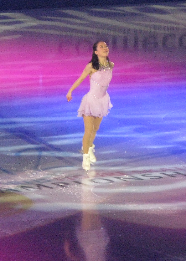 Akiko Suzuki au gala des Championnats du monde de patinage artistique 2012 à Nice.